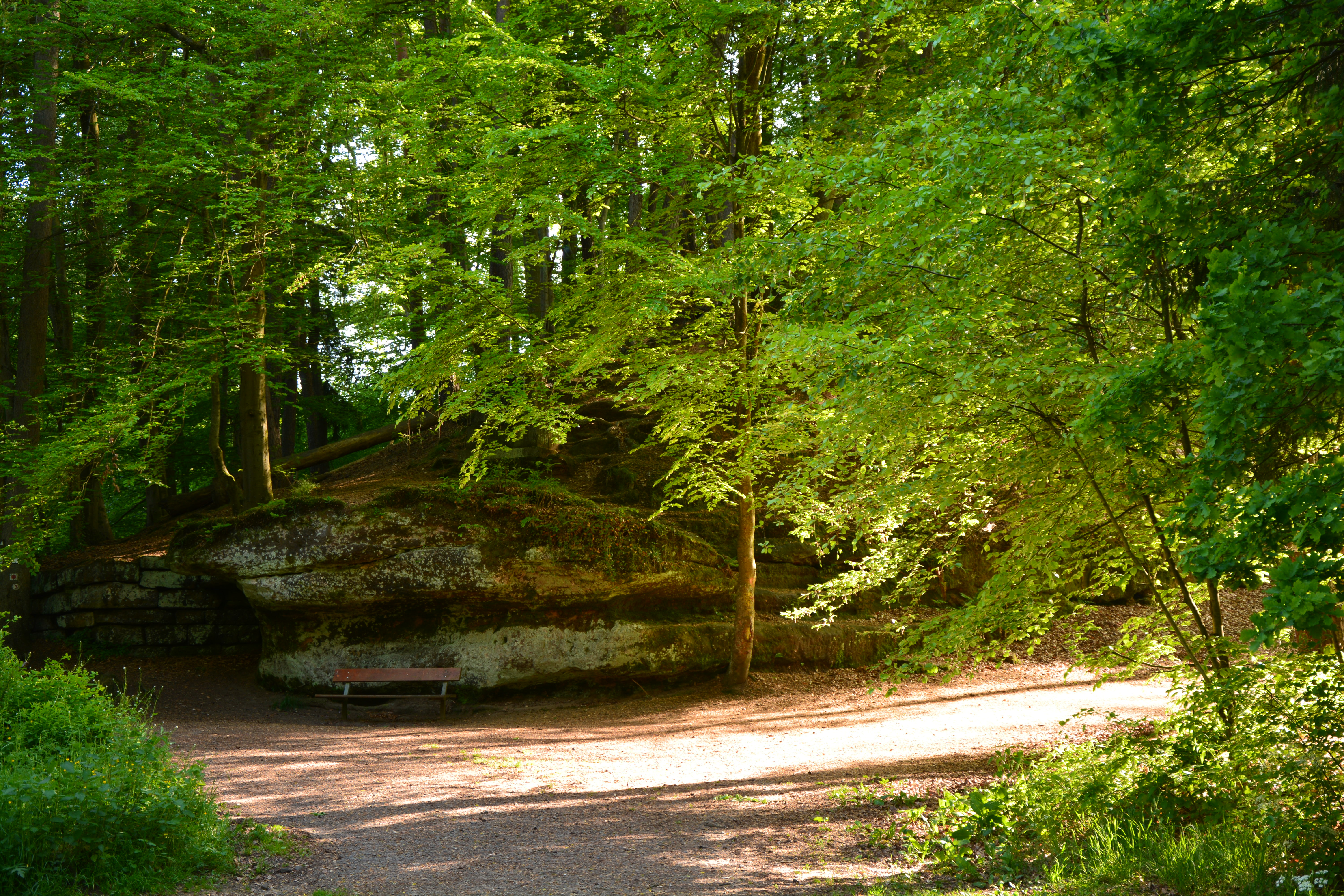 Zentrale Stelle im Naturschutzgebiet Kasbruch (NSG 83 im Saarland) im Abendlicht des 21.5.2016